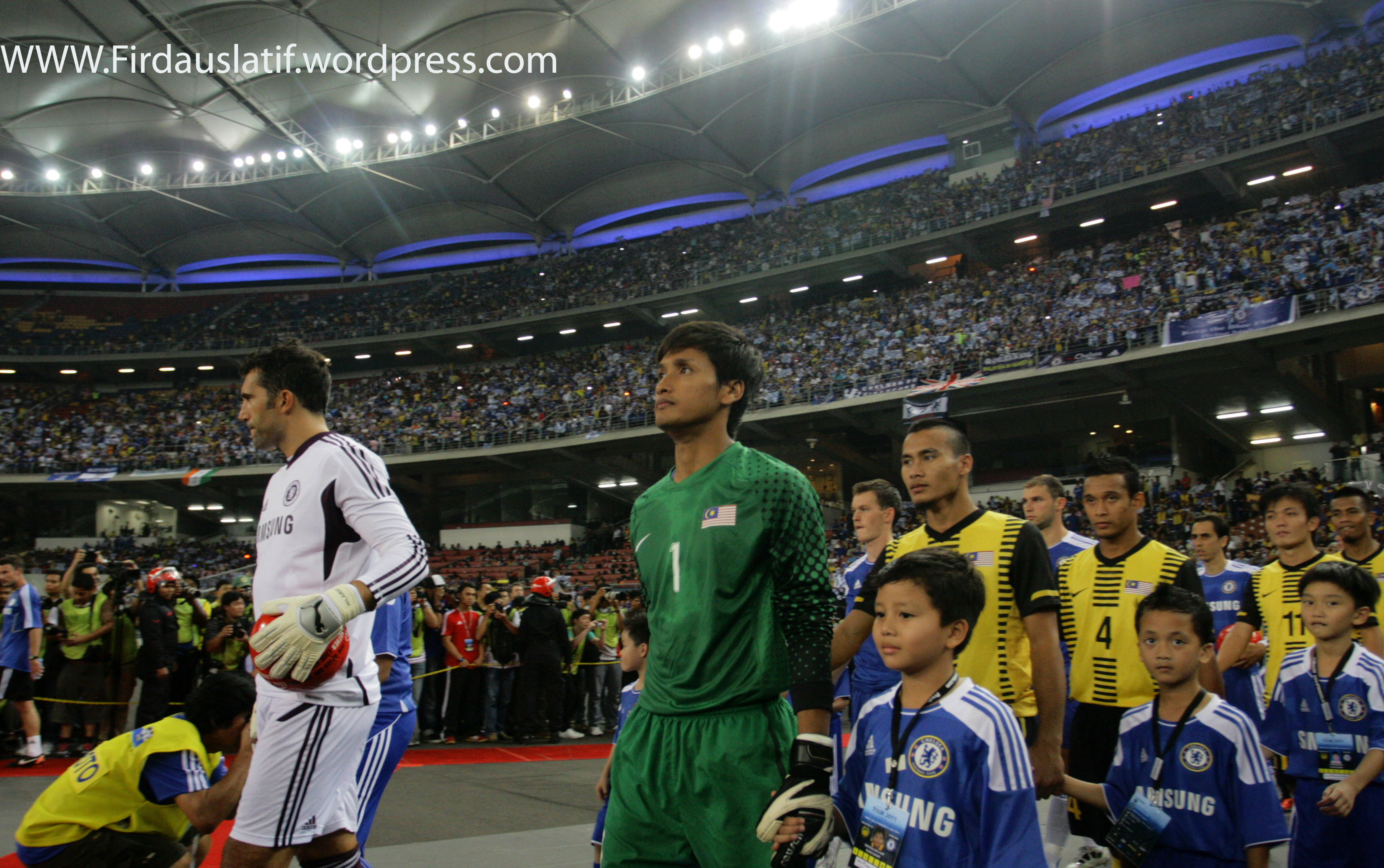 MALAYSIA VS CHELSEA 2011